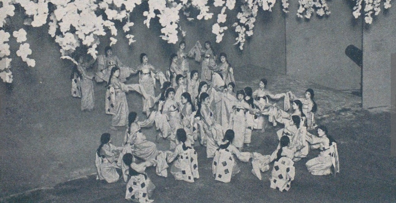 浅草松竹座レビュー